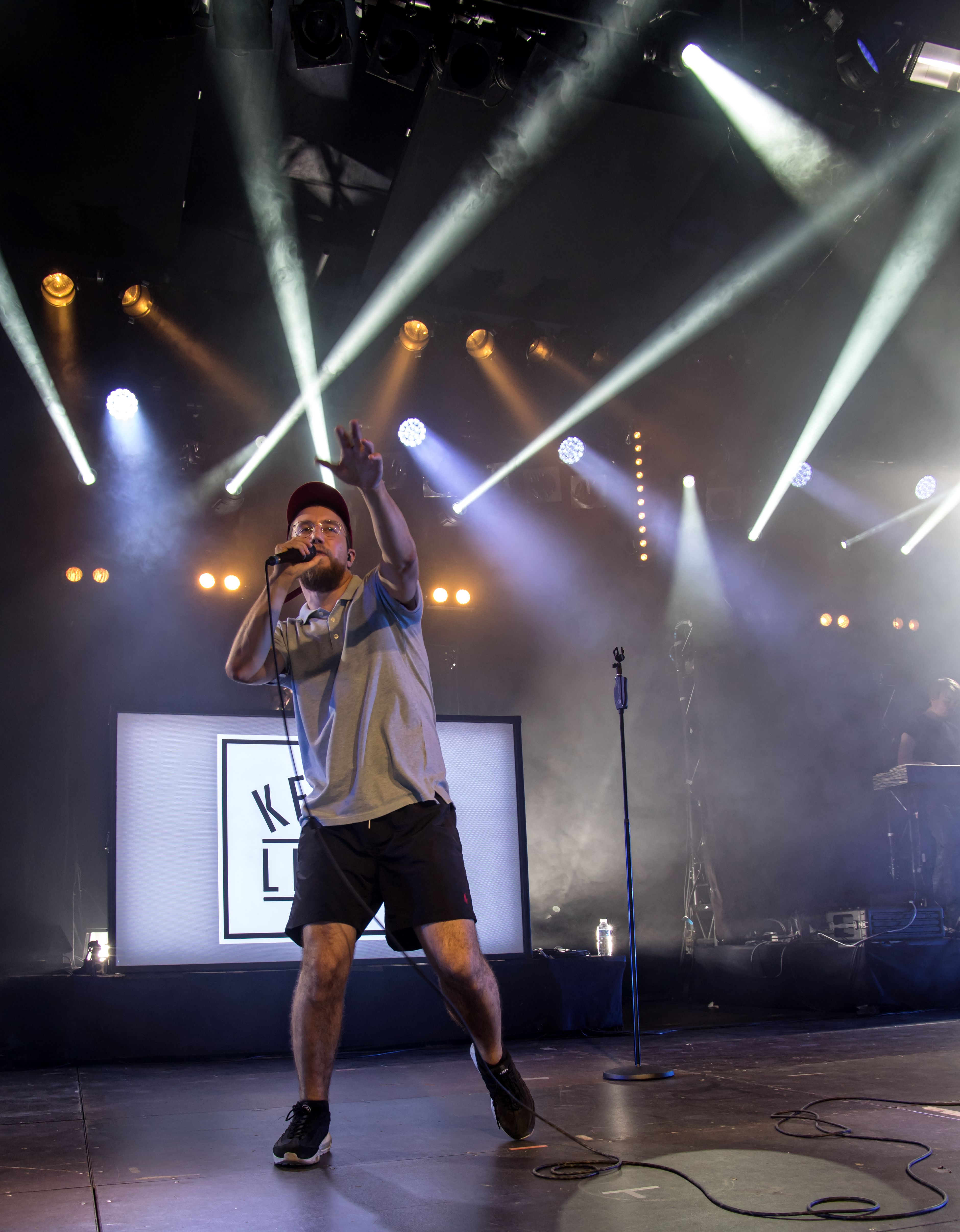 Bilder vom Zelt Musik Festival 2016 in Freiburg im Breisgau Prinz Pi